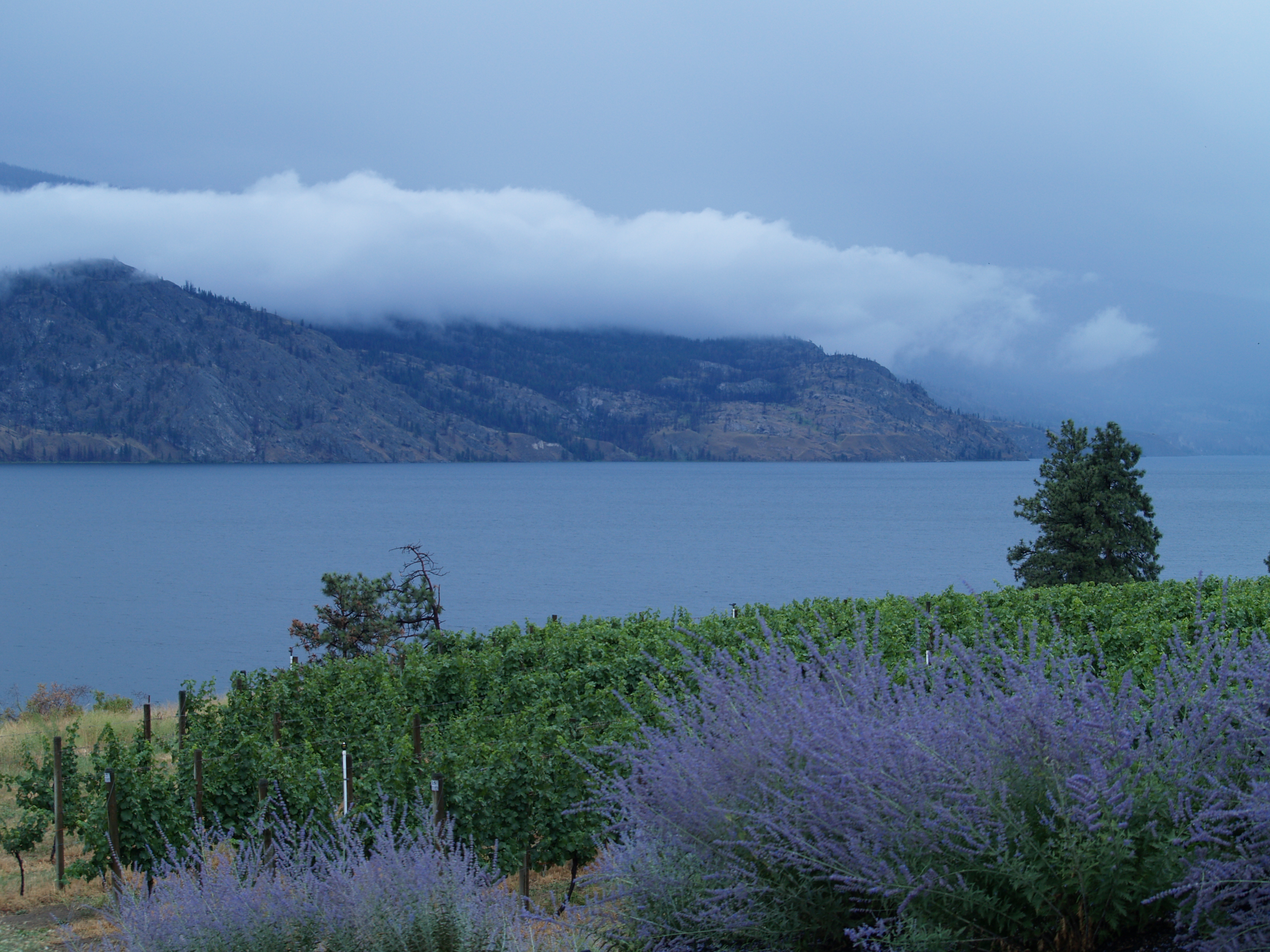 Okanagan Lake